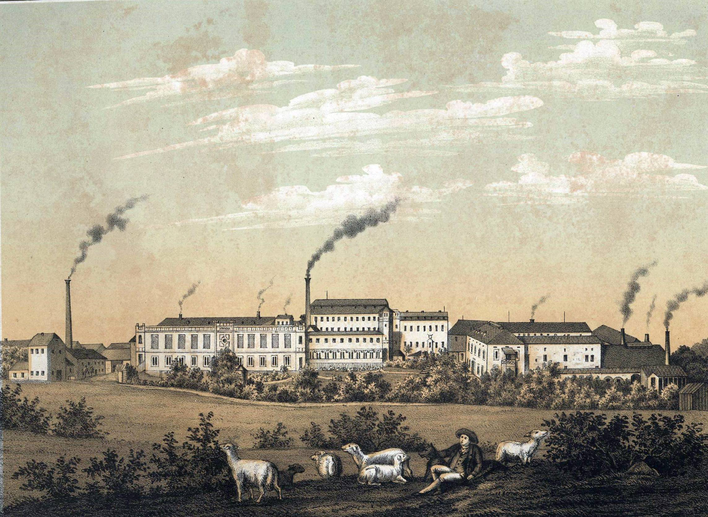 Tuchfabrik der Gebrüder Zschille in Grossenhain aus: Album der Sächsischen Industrie Erster Band